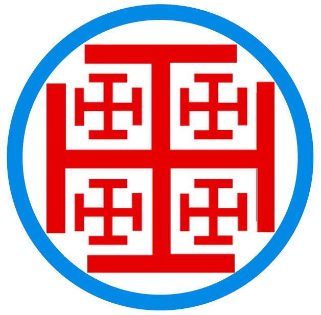 Escudo de la Hermandad de El Silencio